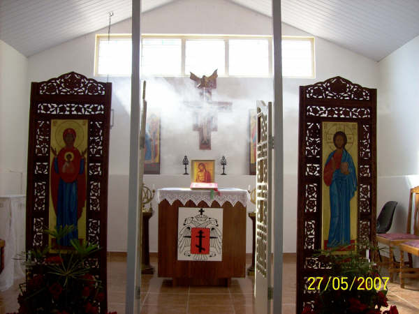 Capela do Mosteiro dos Filhos Misericordiosos da Cruz